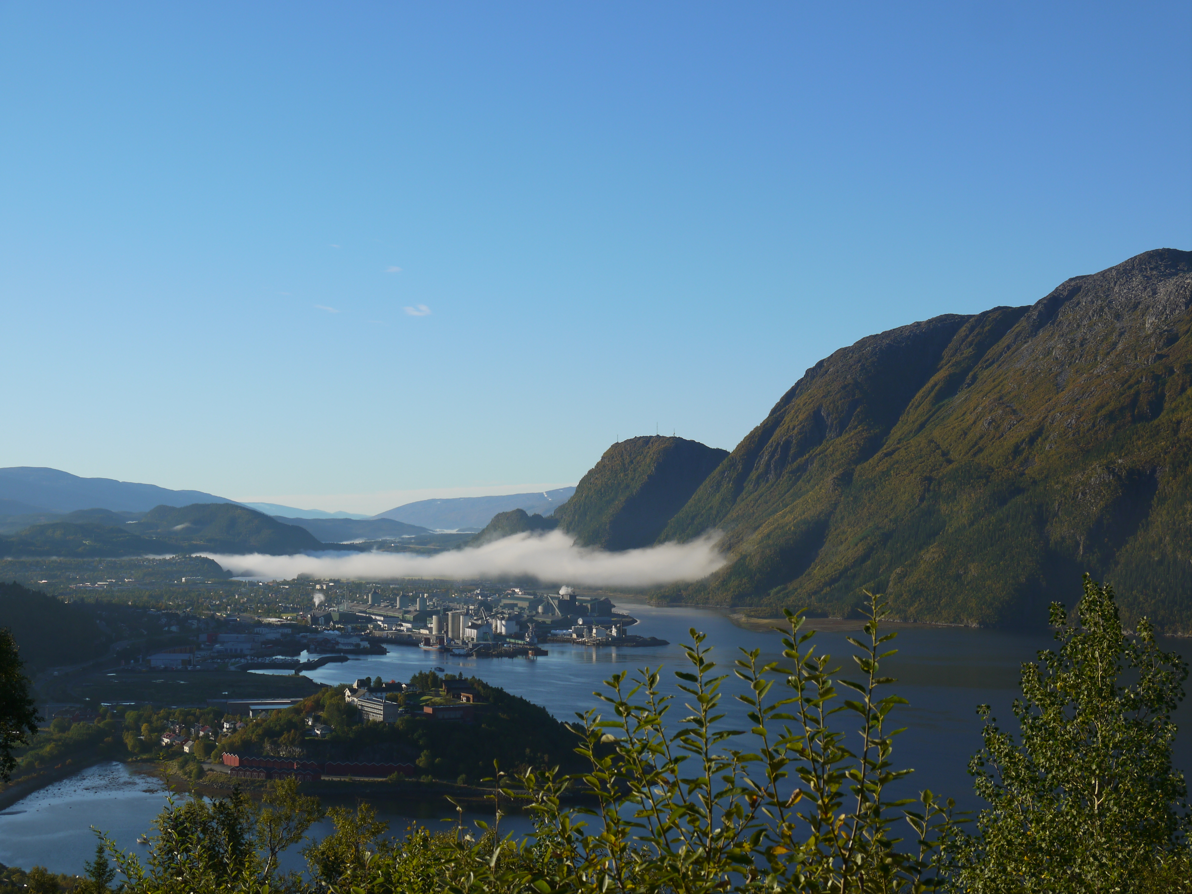 Mosjøen town with the Alcoa smelter. Morning fog over the Vefsna river, all the way up the valley. Taken from the Rynesåsen vantage point, facing south. Dated Sept 16, 2016. Panasonic LUMIX GF3, no filter or picture modifications.